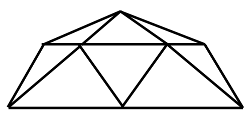 Схематическое изображение огранки розой